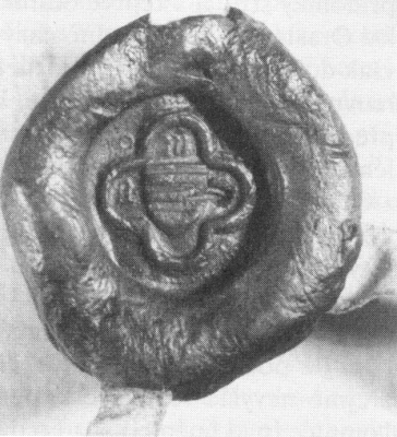 Sekretní pečeť Ješka Pušky z Kunštátu, konec 14. století